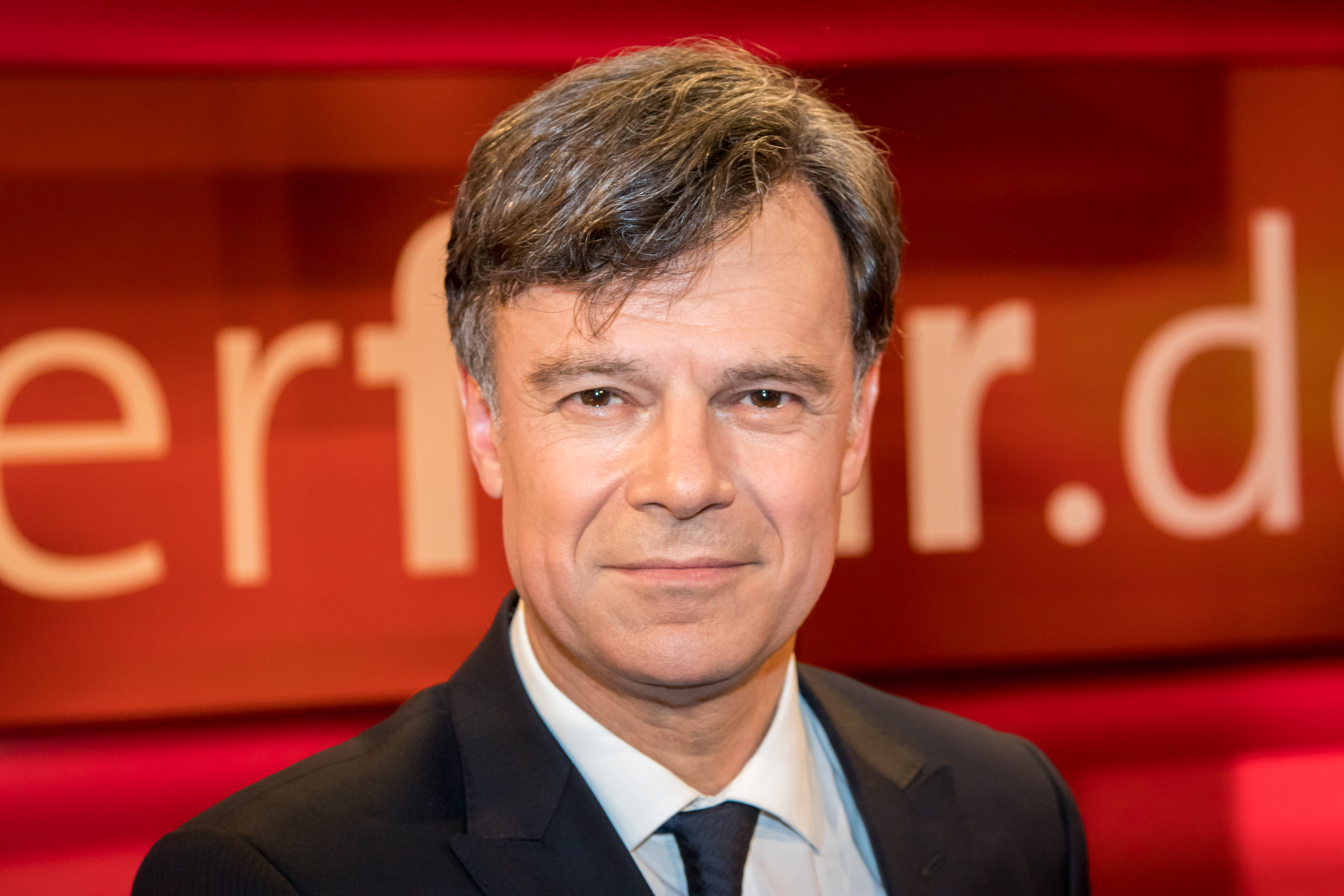 Giovanni Maio in der WDR-Sendung "hart aber fair" am 20. März 2017